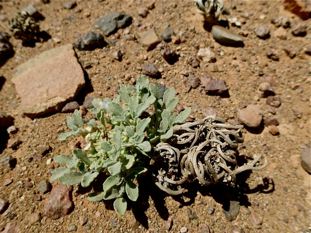 Plante étonnante, la rose de Jéricho doit son nom à sa « renaissance perpétuelle », comme la ville biblique de Jéricho, qui ne cessait de renaître de ses cendres.Quand l’humidité est insuffisante, elle se dessèche et paraît morte...